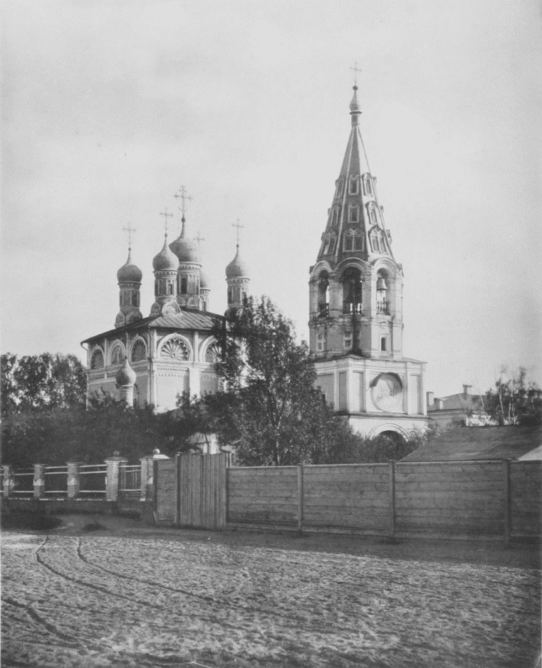 Храм св. ап. Петра и Павла в Солдатской слободе, в Лефортово. Москва, Солдатская улица, 4.